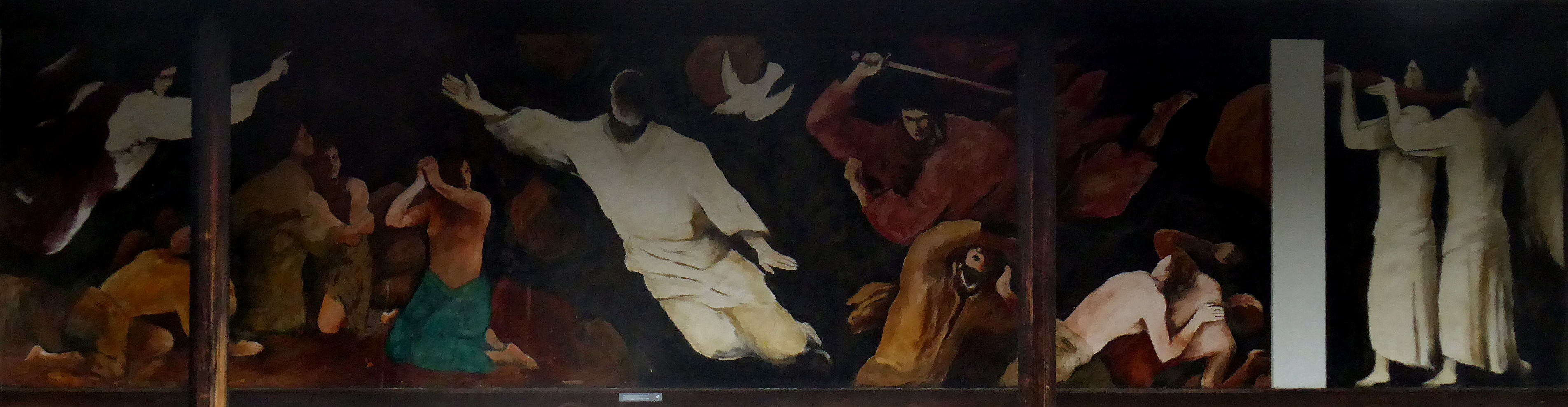 Wandfresko «Das Jüngste Gericht» von Heinrich Altherr (1878–1947) auf dem Friedhof am Hörnli, Riehen, Basel-Stadt